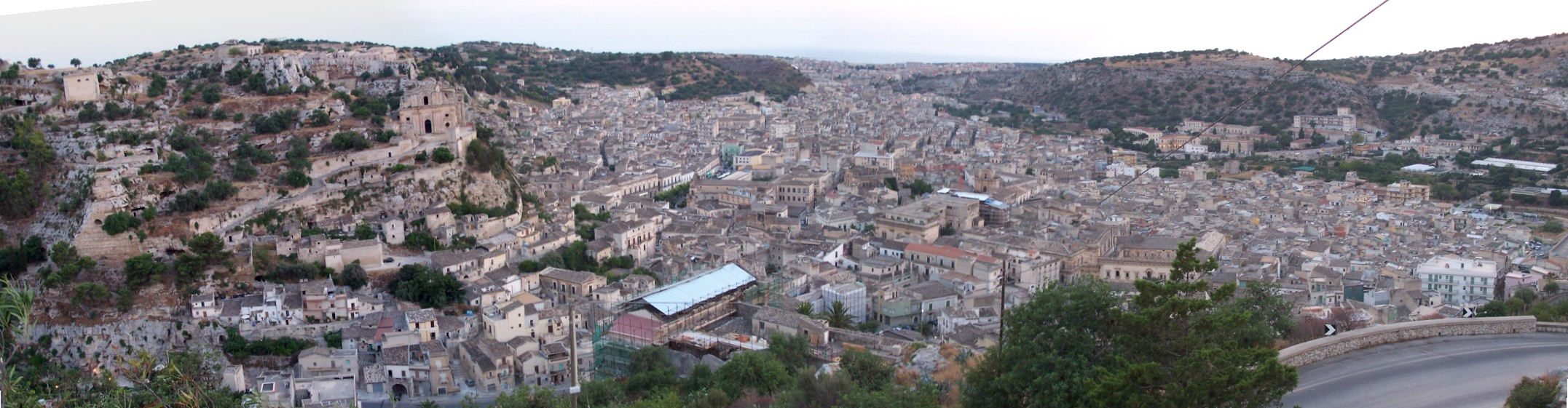 Panorama di Scicli